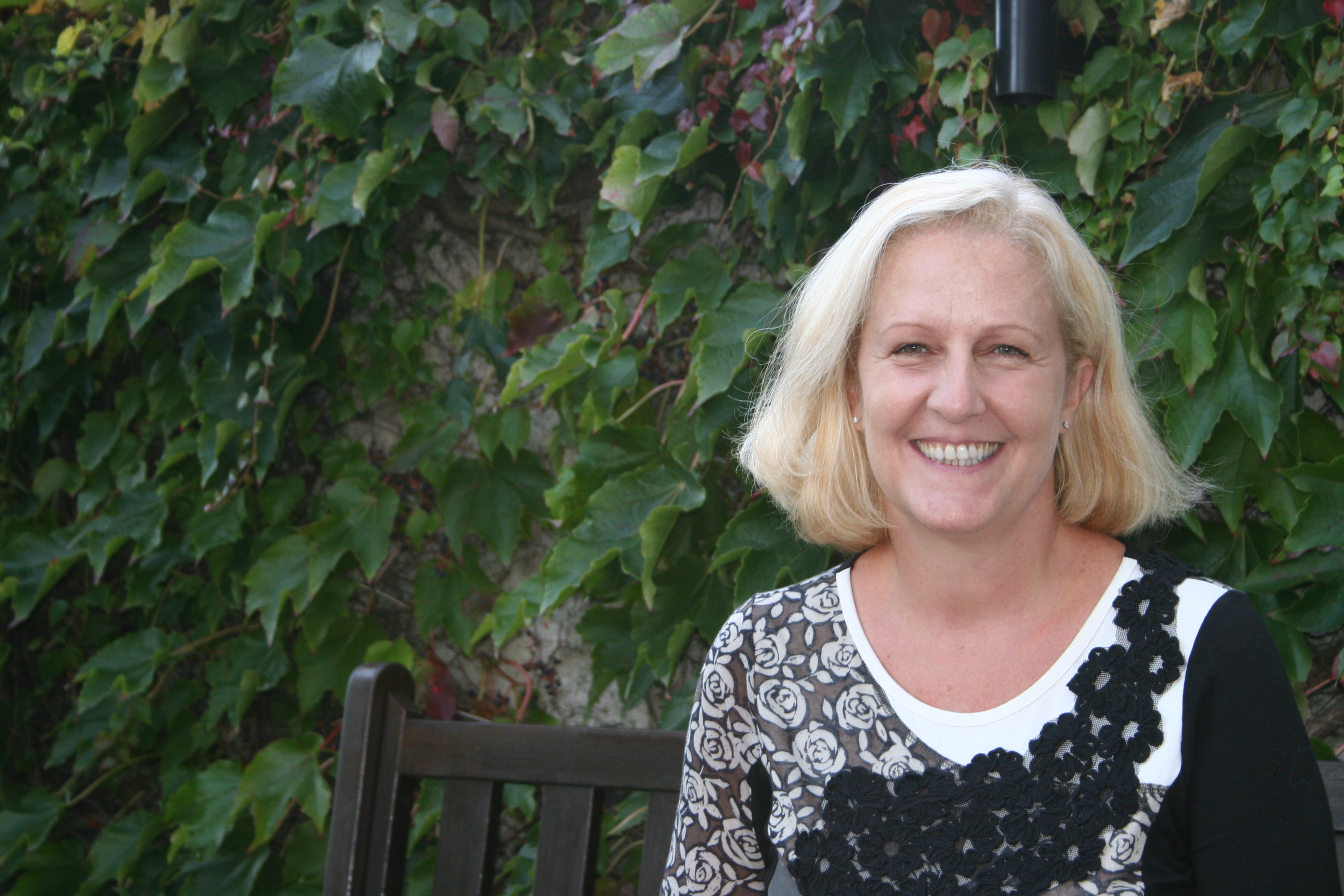 florentine mulsant